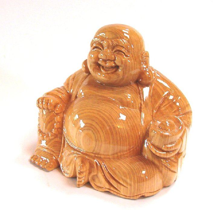 Chi ha inserito l'immagine è anche il creatore dell'immagine stessa.